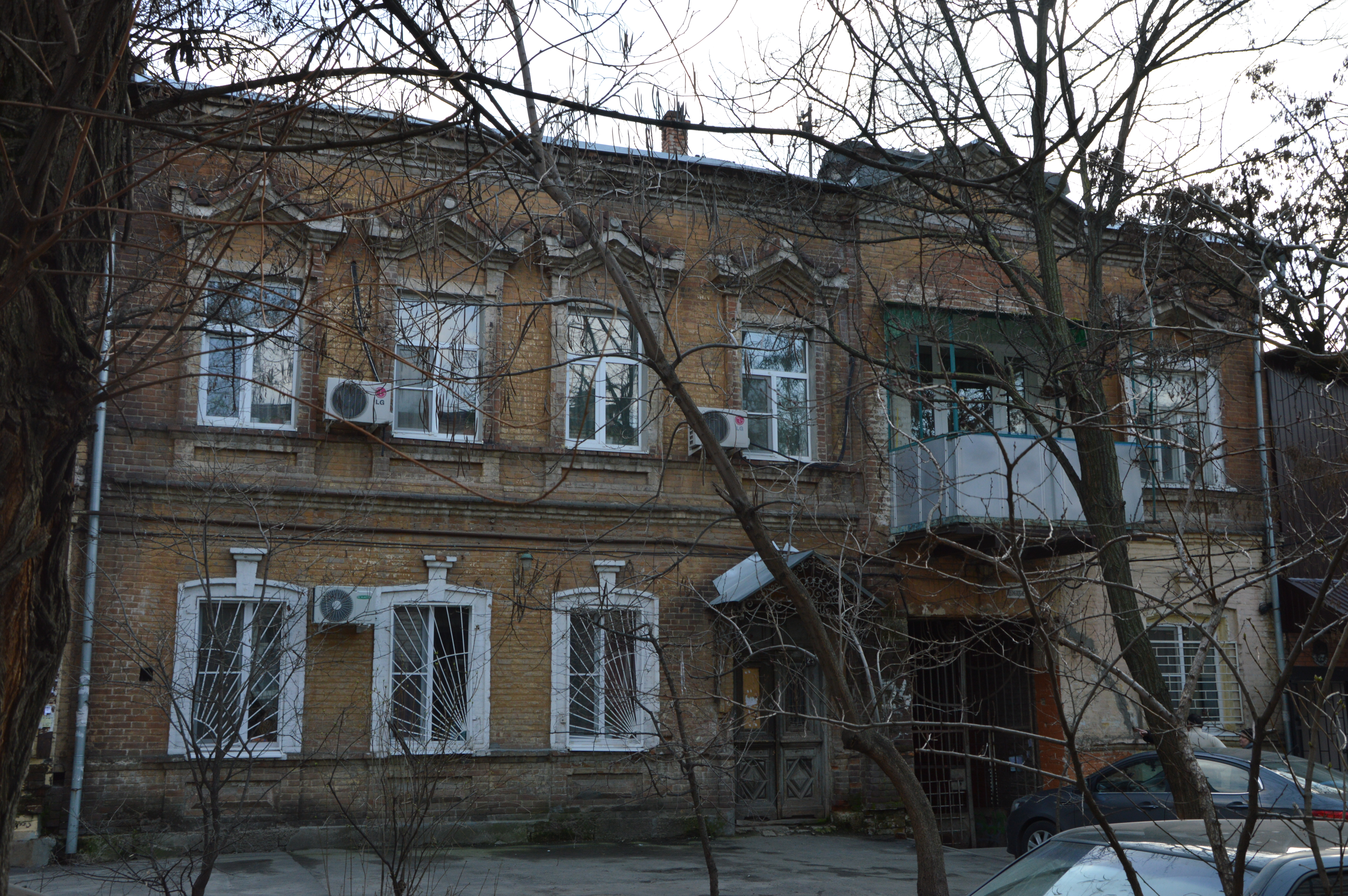 Здание города Ростова-на-Дону